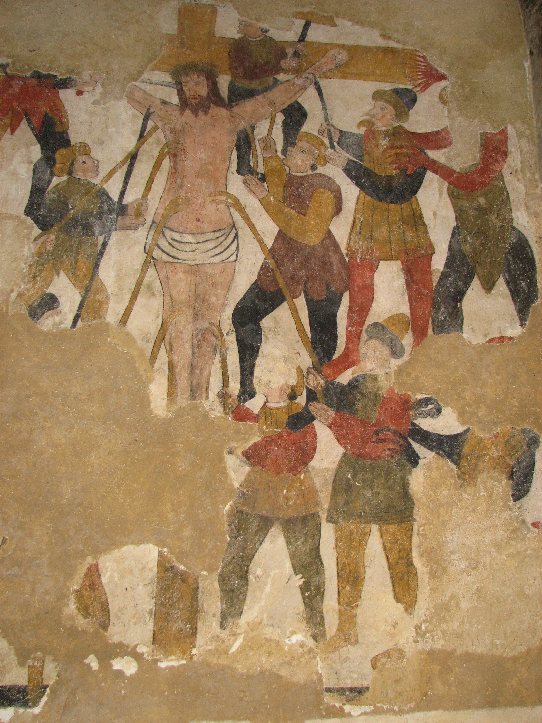 Fresque de la chapelle Notre-Dame de Cran à Treffléan (Morbihan), datée de 1594